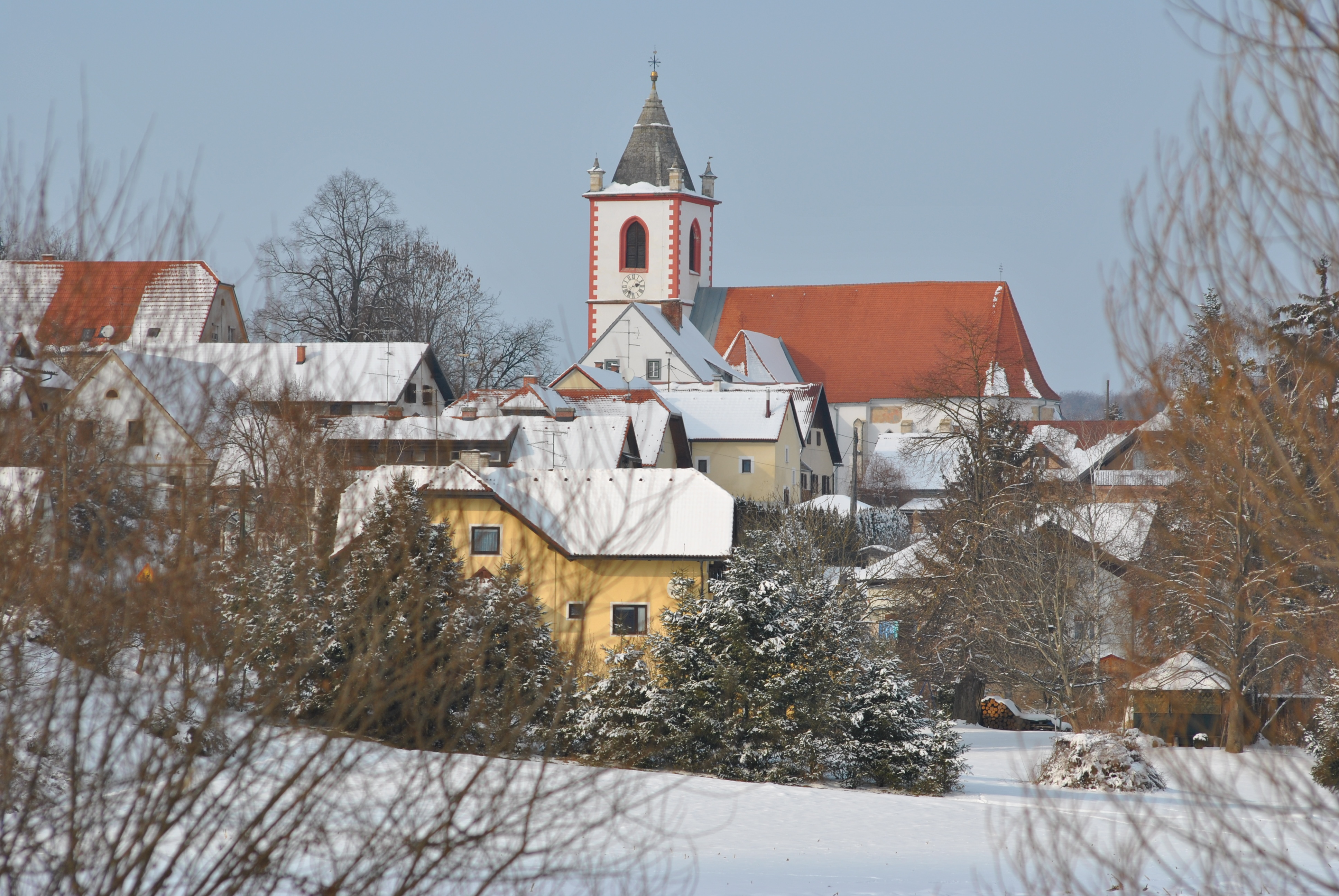 Jareninski Dol je naselje v Slovenskih goricah in del krajevne skupnosti Jarenina Občine Pesnica.